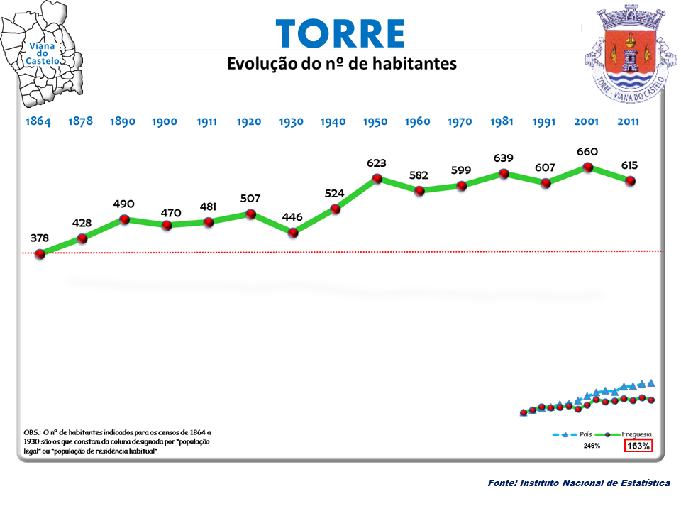 Censos 1864/2011